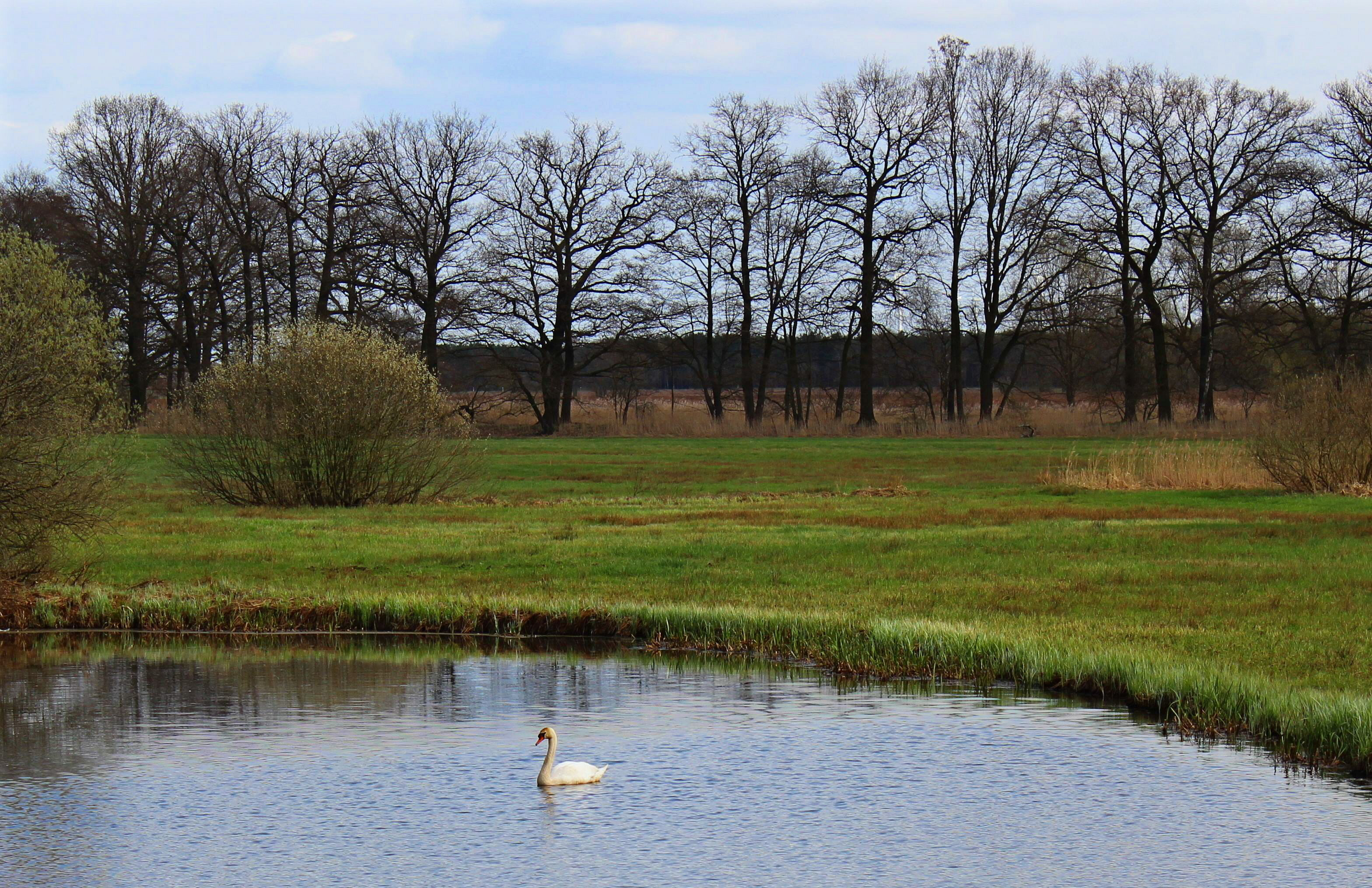 Das Naturschutzgebiet Alte Röder bei Prieschka.